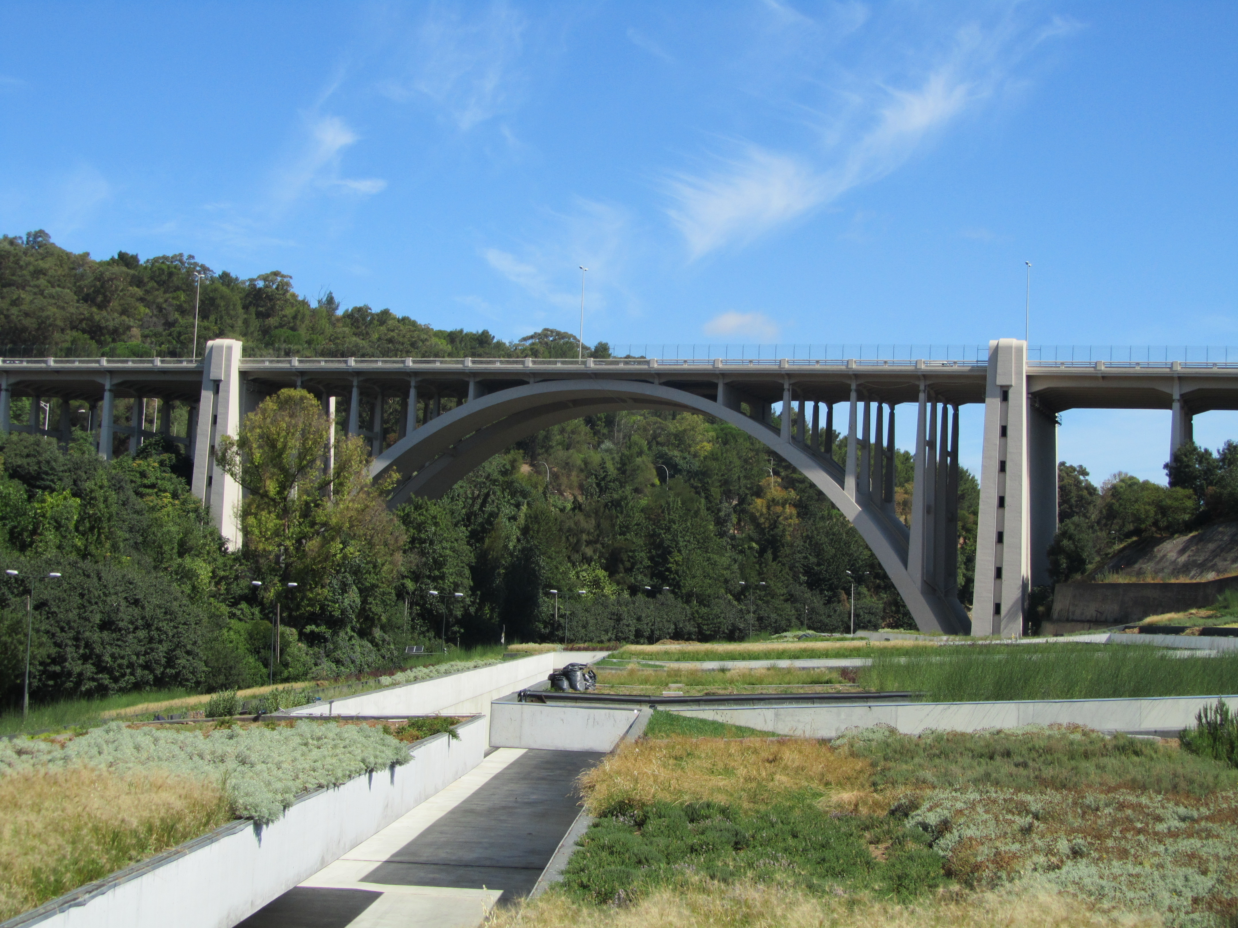 Vista do viaduto Duarte Pacheco a partir da ETAR de Alcântara